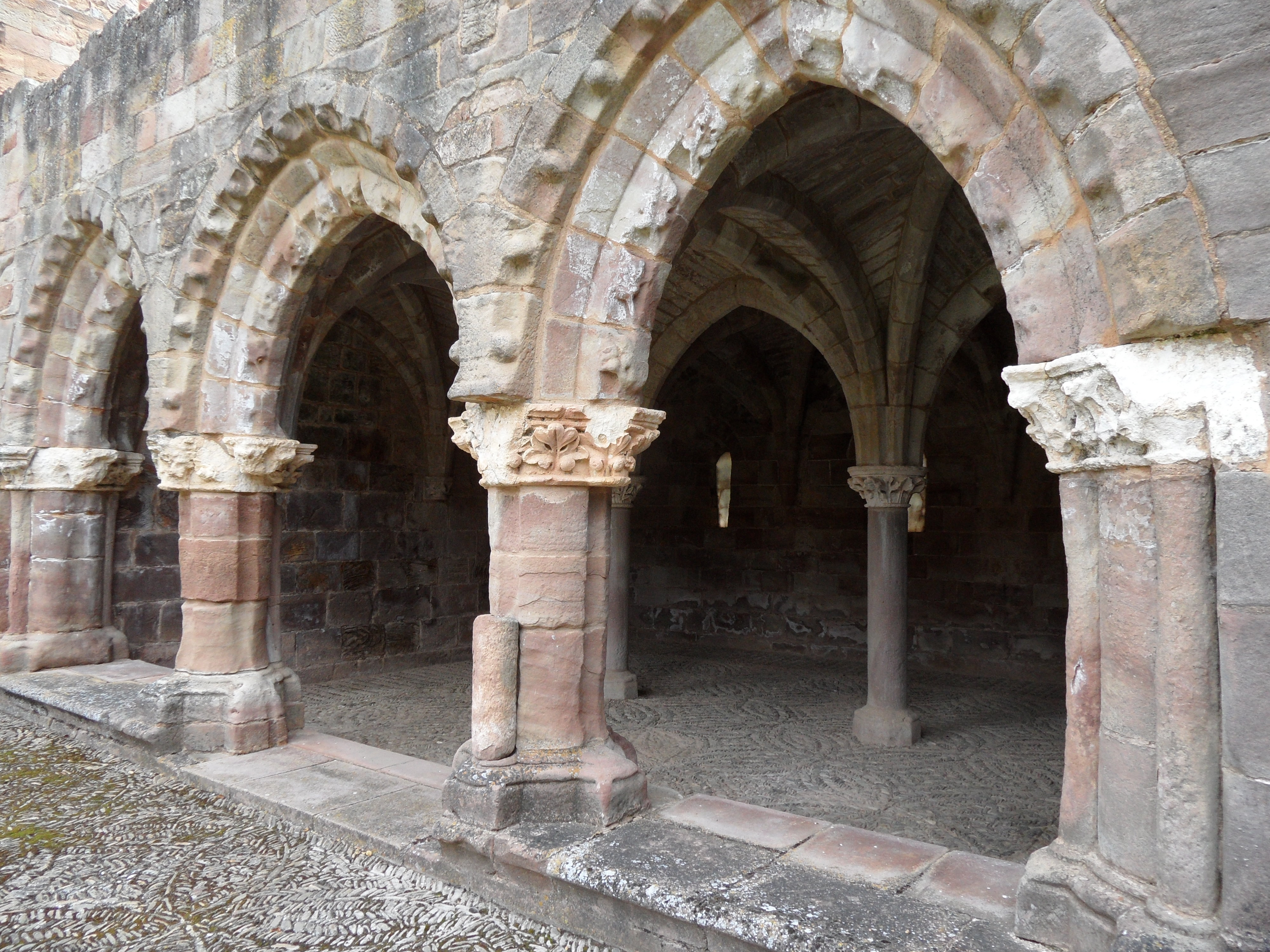 Monasterio Santa Maria de Bujedo de Juarros. Este Monasterio es de propiedad privada, y ha sido restaurado siendo galardonado por la Asociación Europa Nostra en el año 1981